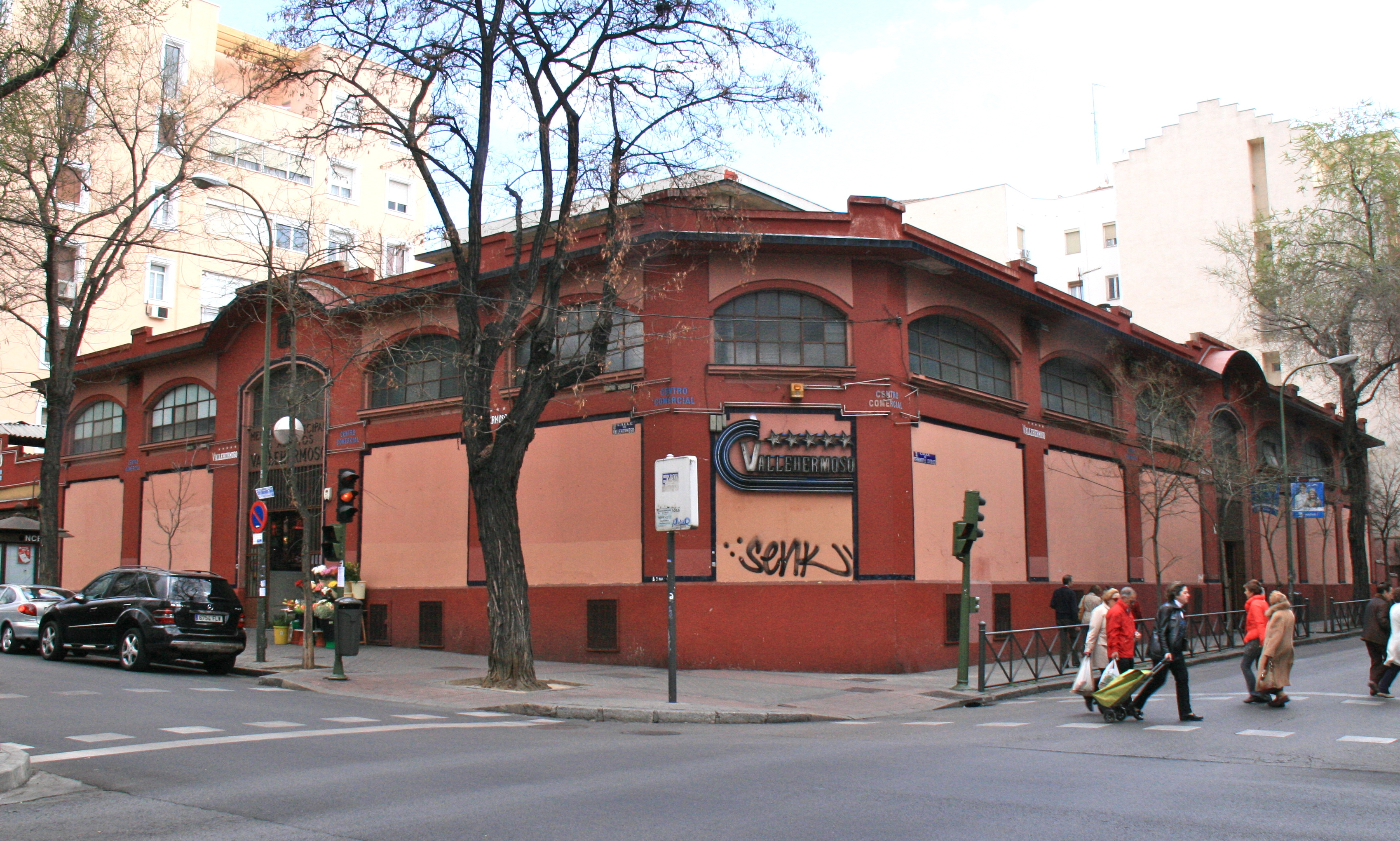 Mercado de Vallehermoso, Chamberí, Madrid. Esquina de la calle Vallehermoso con la calle Fernando el Católico.